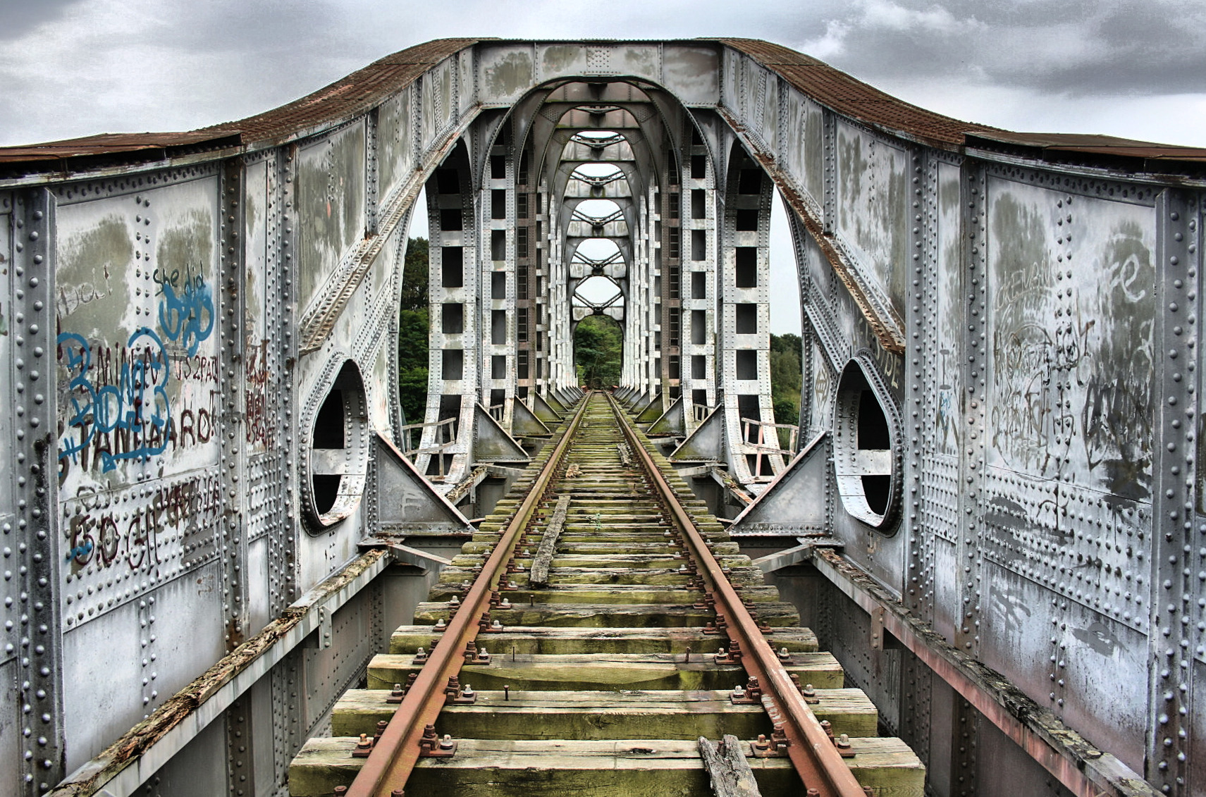 Verlaten spoorbrug bij Gelik HDR 2011